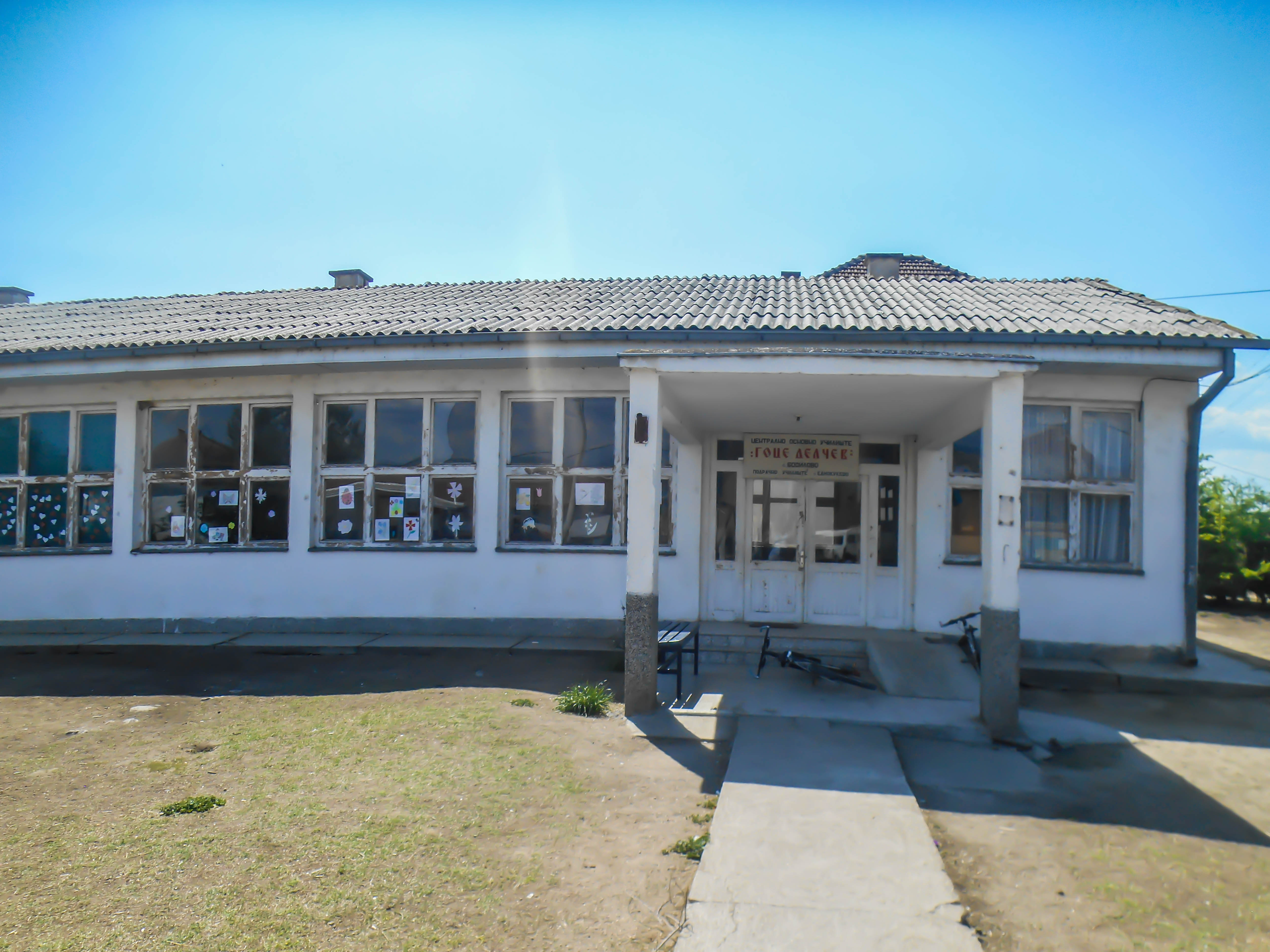 Основно училиште „Гоце Делчев“ - Еднокуќево